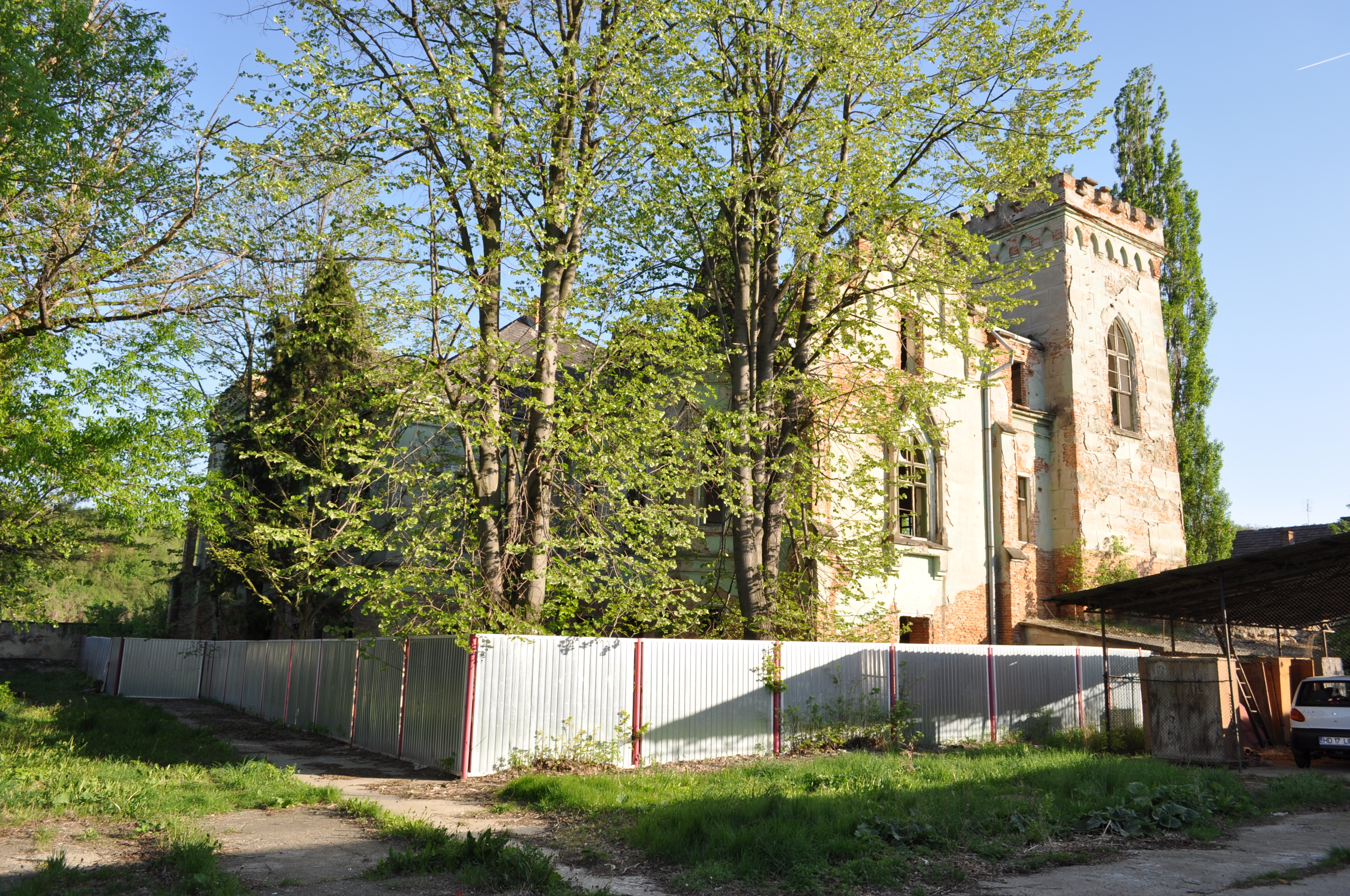 Castelul contelui Nopcsa, sat SĂCEL; comuna SÂNTĂMĂRIA-ORLEA 01